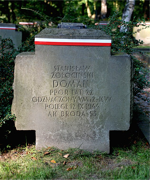 Grób na Powązkach Wojskowych w Warszawie